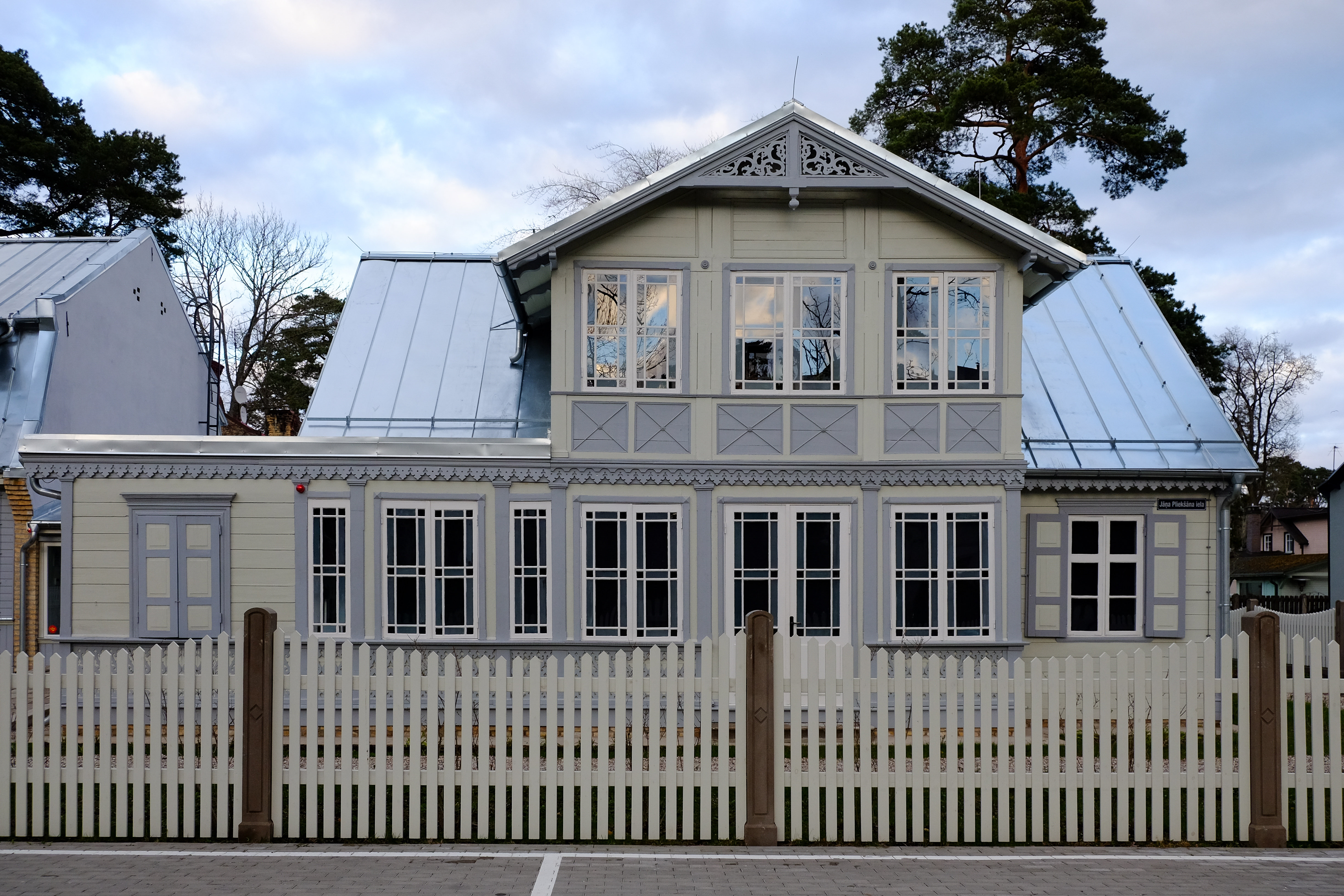 Dzejnieka Raiņa dzīves vieta, Jūrmala, Jāņa Pliekšāna iela 7